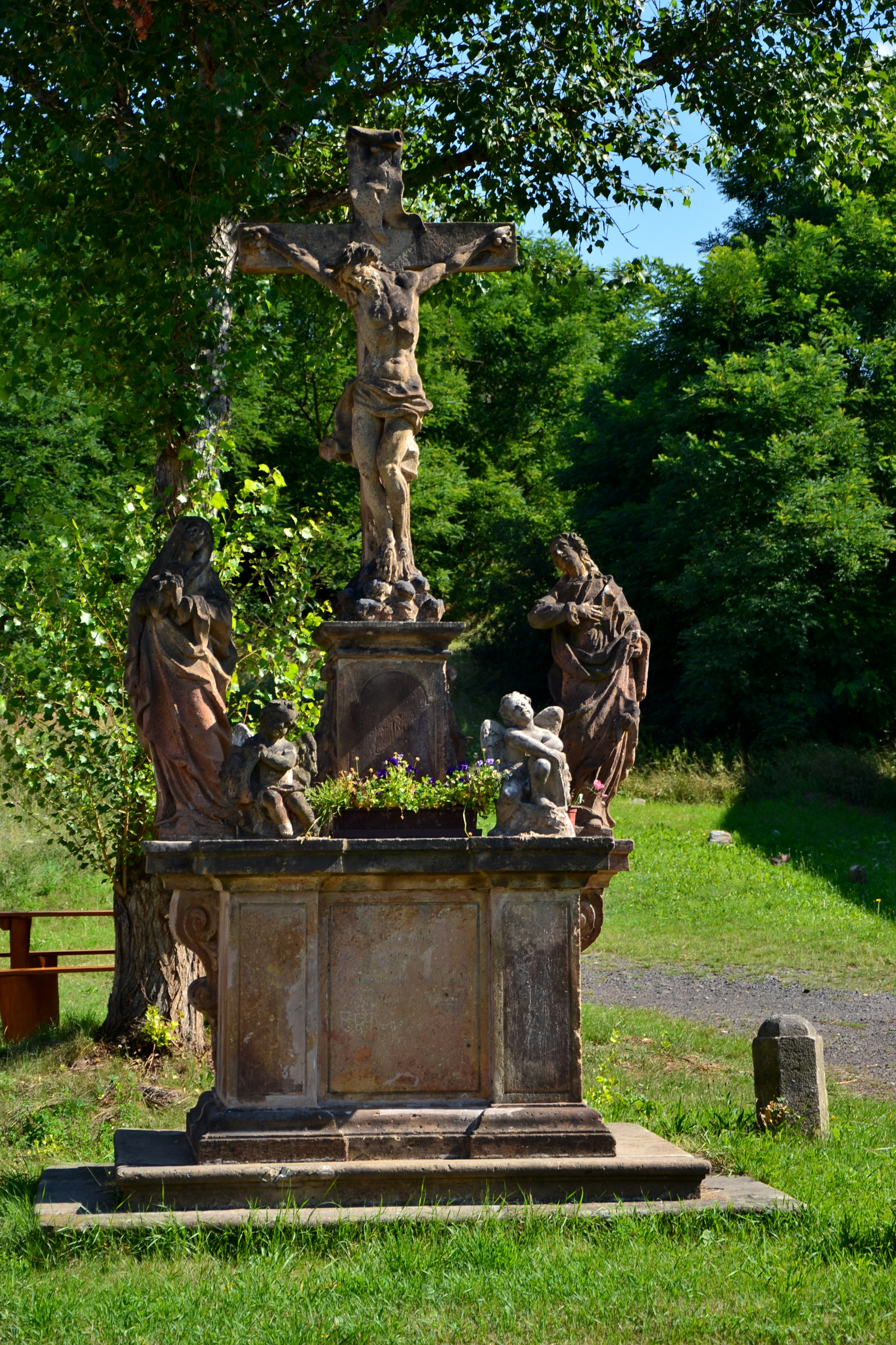 Sousoší, Stranná (Březno).